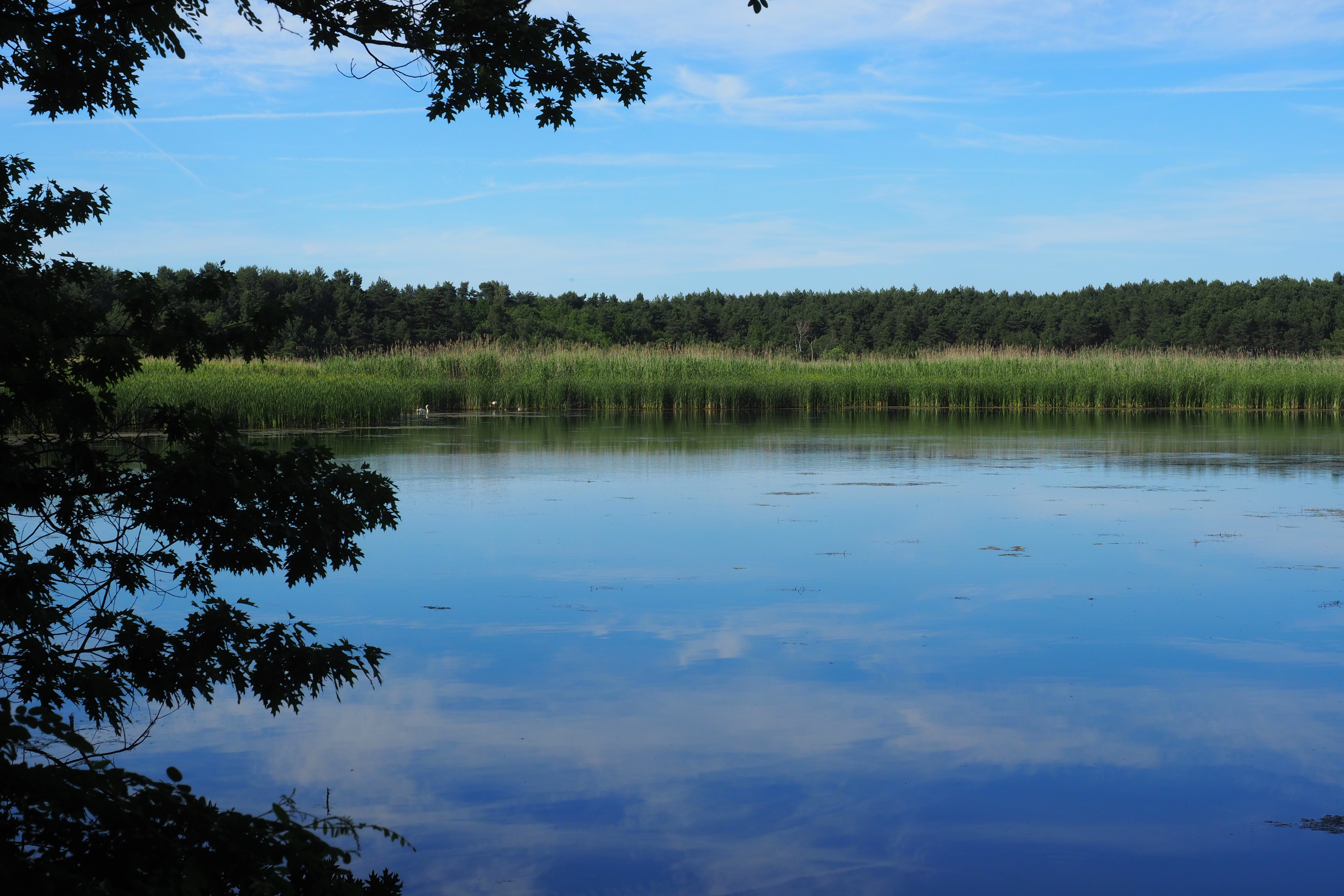 Naturschutzgebiet Lugteich bei Grüngräbchen